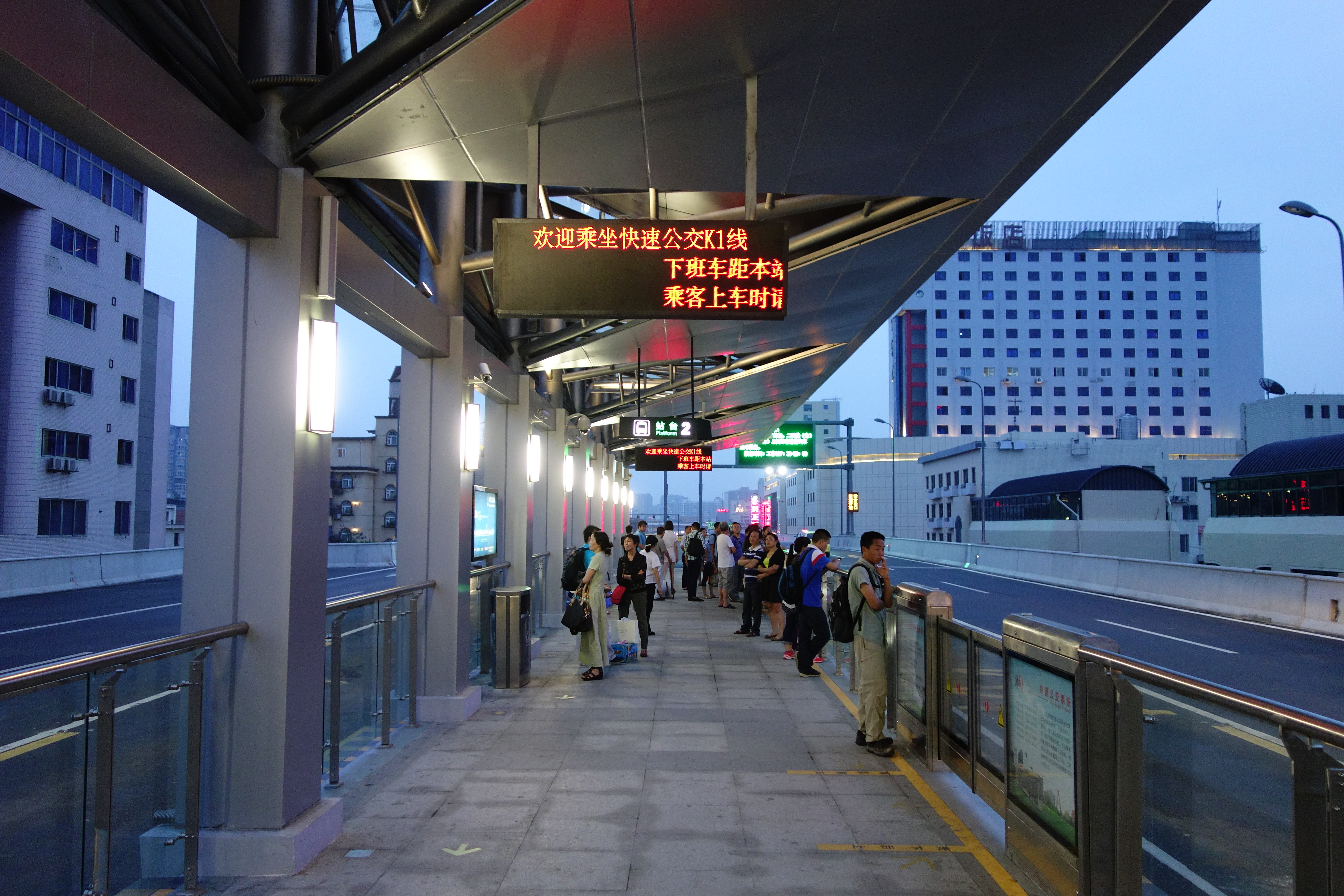 二环快速公交-火车北站东站站台